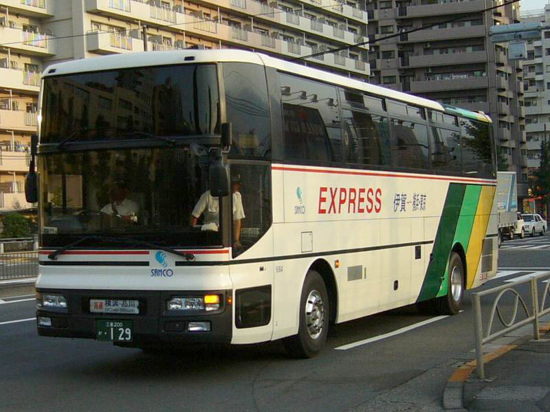 登録番号：三重200か・129 三重交通バス所属 いが号用